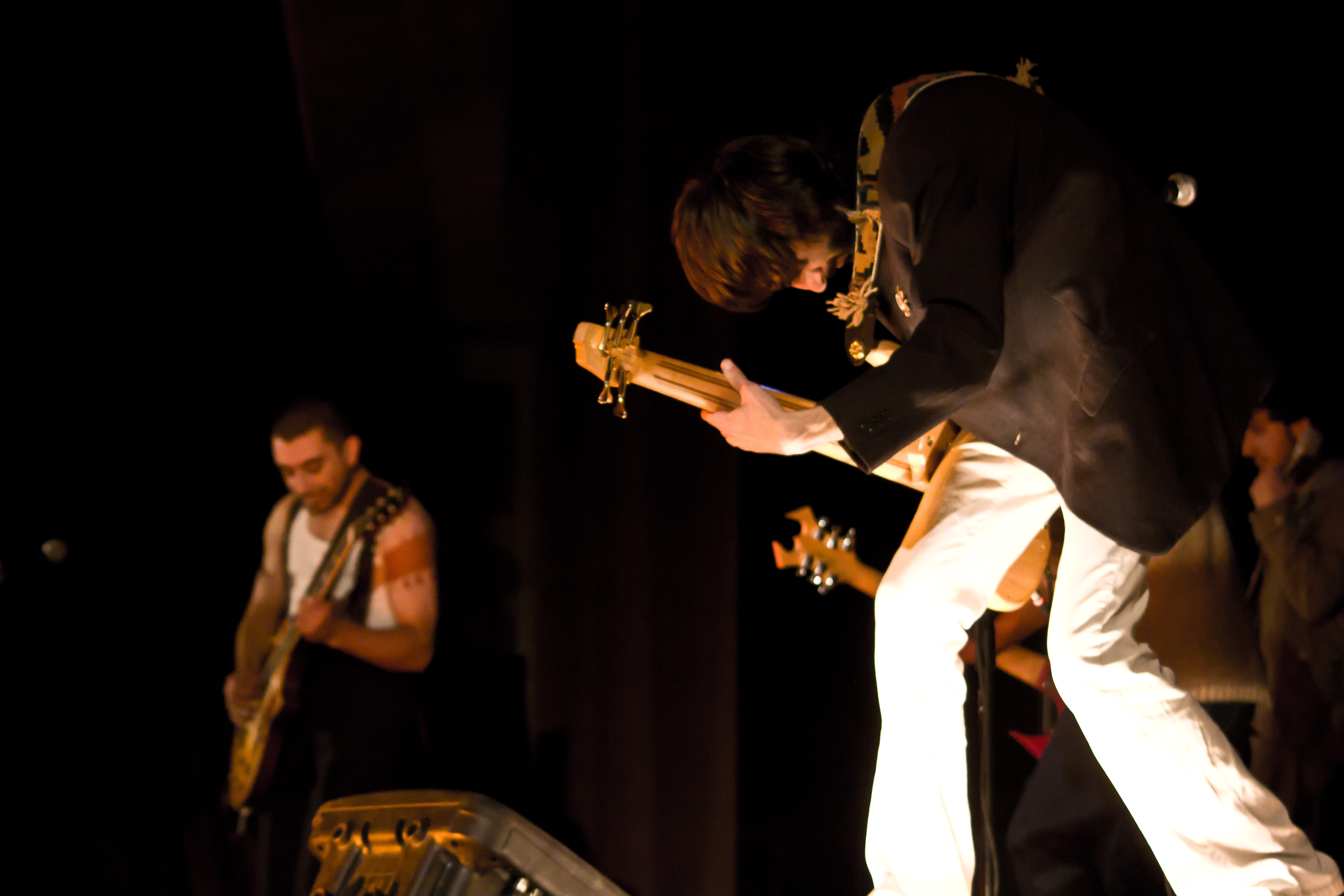 Որդան Կարմիր ռոք խումբ, Դավիթ Գրիգորյան, Դավիթ Գալստյան